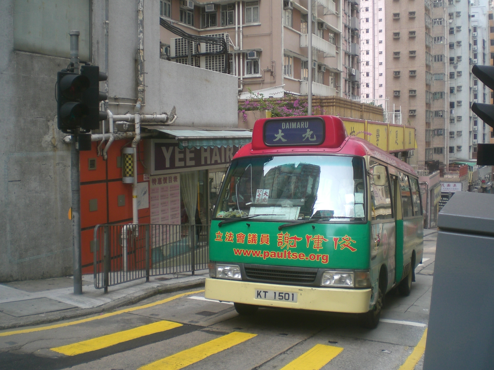 香港西環第三街近西邊街，小巴往大丸